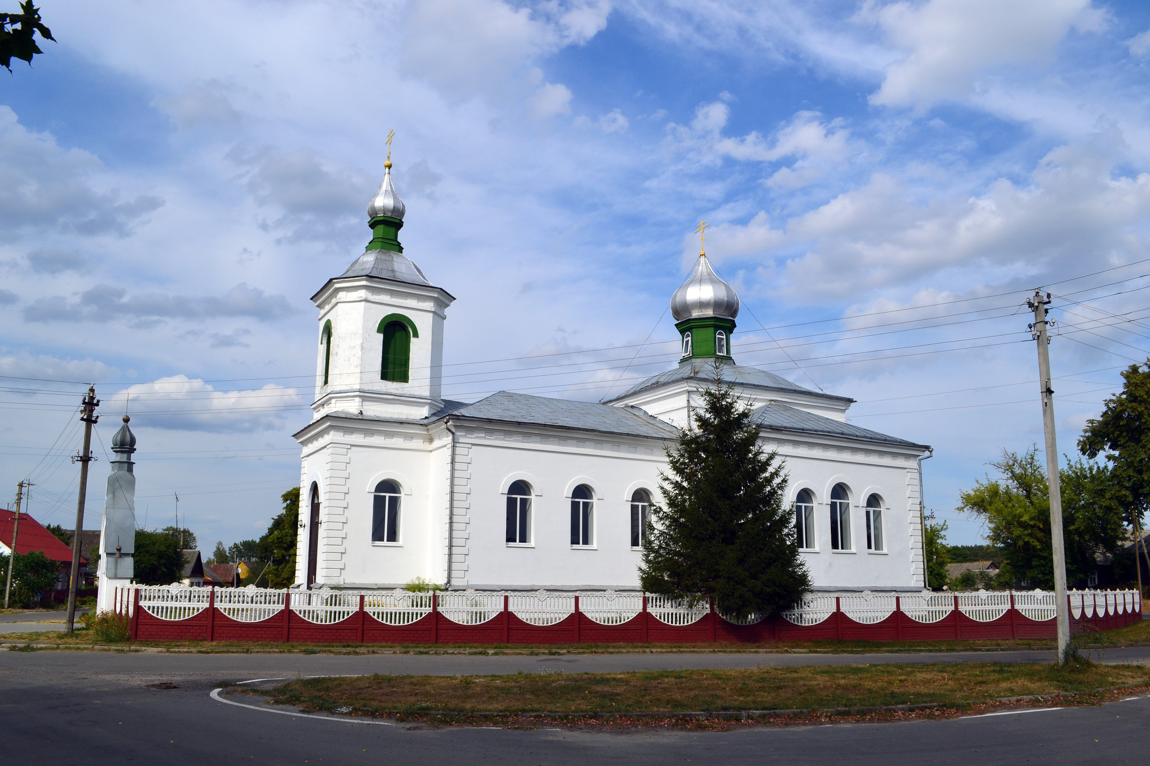 Беларуская (тарашкевіца): Праваслаўная царква сьвятога Сімяона ў Малечы (Бярозаўскі раён).